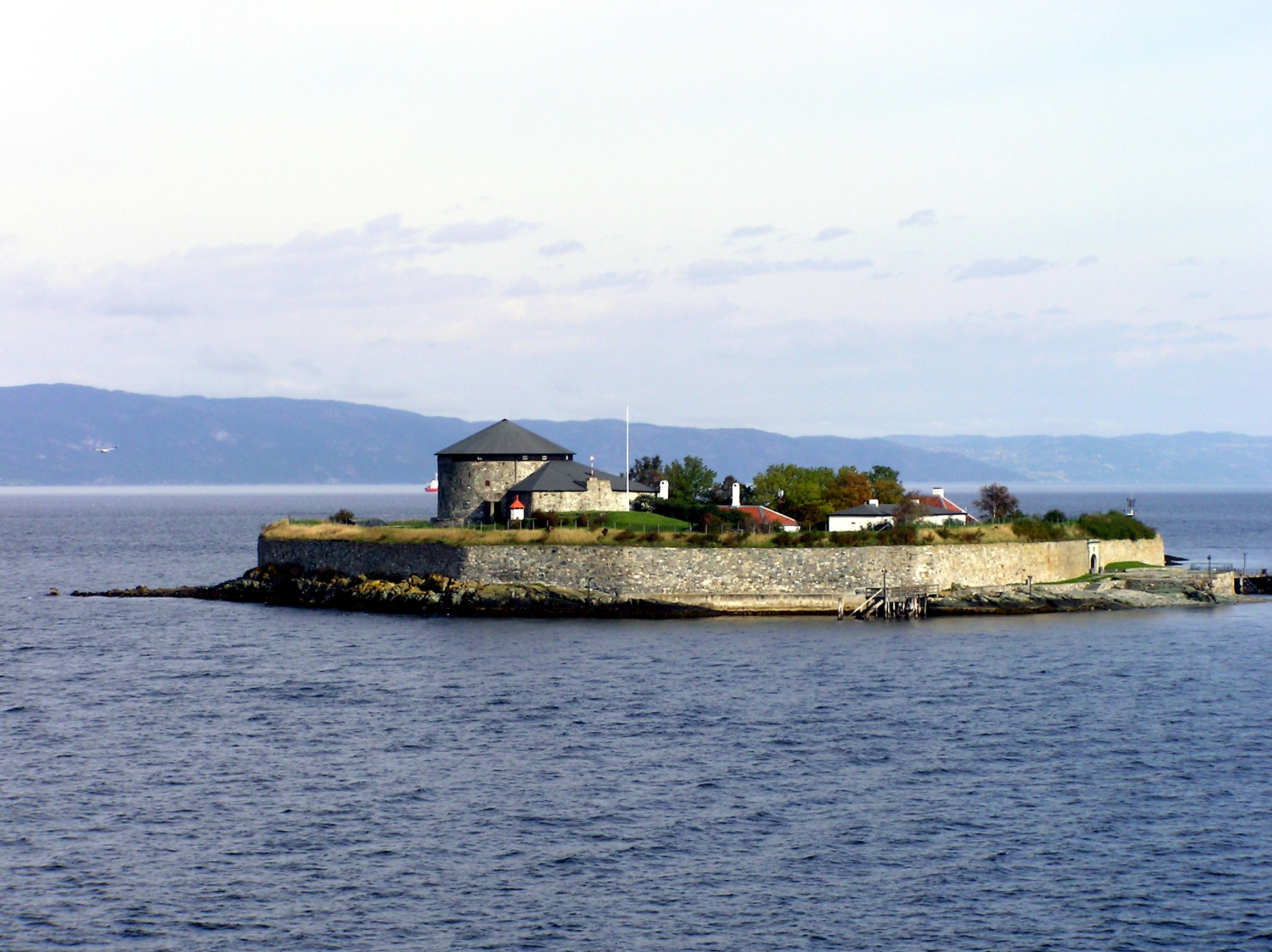 Island Munkholmen Trondheim/Norway